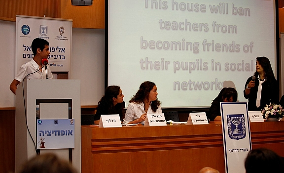 דיבייט בין בתי ספר מתוך תחרות "שיח ושיג" - אליפות ישראל בדיבייט ביוזמת המרכז להעצמת האזרח ובשיתוף משרד החינוך